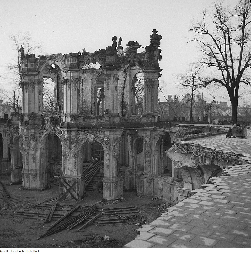 Original image description from the Deutsche Fotothek Zwinger. Ruine des Wallpavillons und der nördlichen Bogengalerie